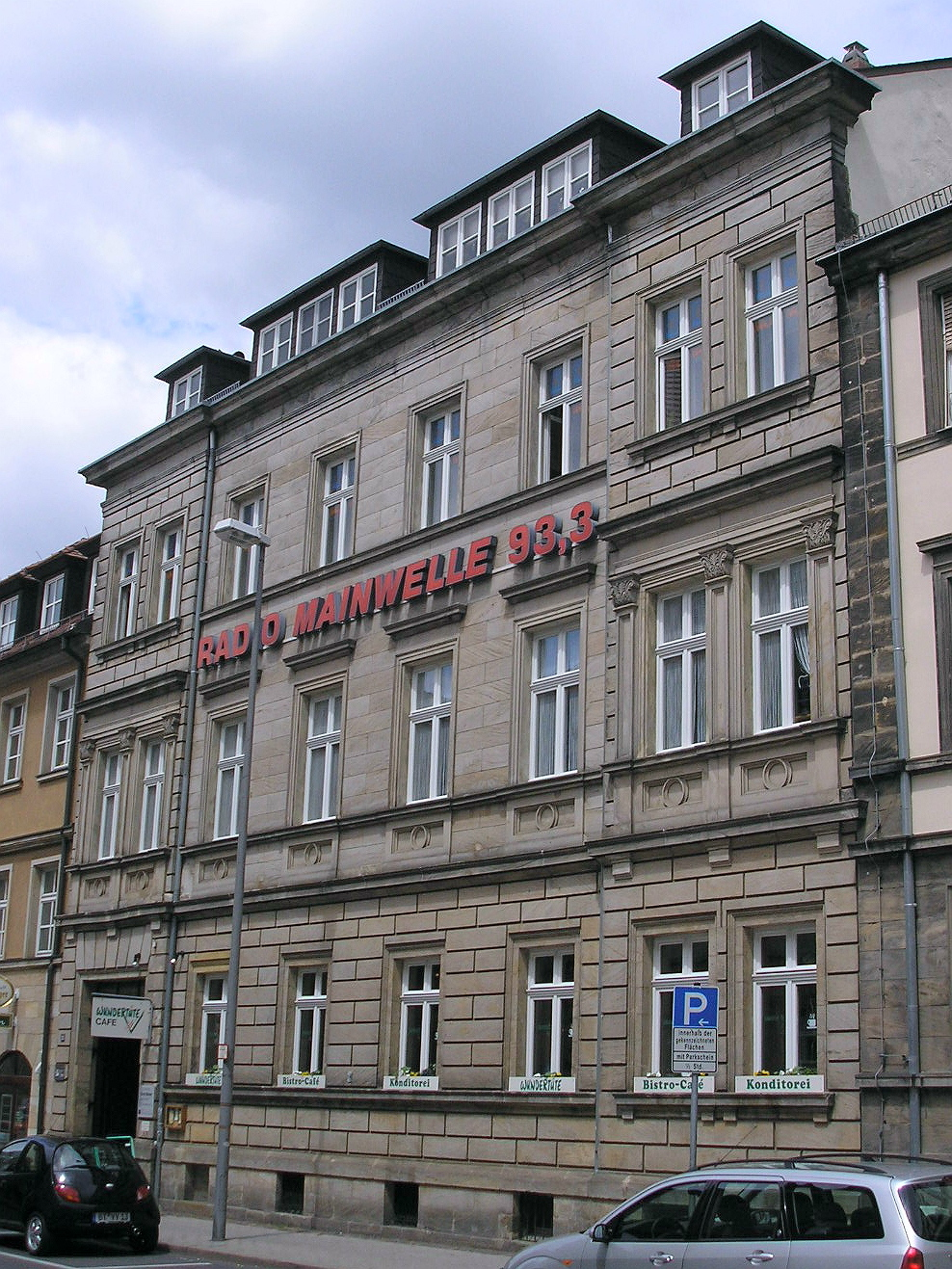 Gebäude des Radiosenders Mainwelle in Bayreuth